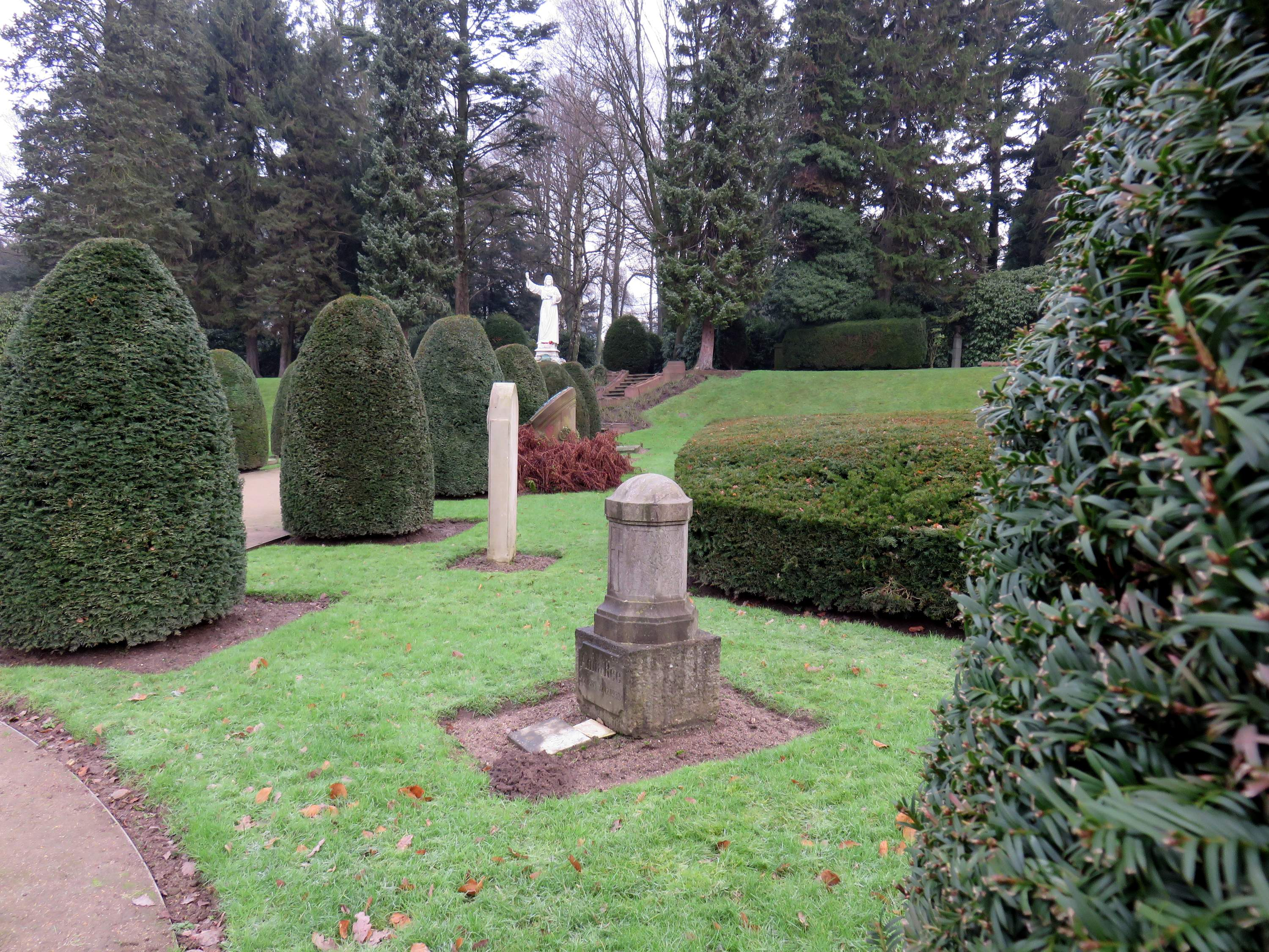 Lage des Grabmals zu Ehren der deutschen Malerin Anita Rée im Bereich des Althamburgischen Gedächtnisfriedhofs auf dem Hamburger Friedhof Ohlsdorf, Kreuzungsbereich der beiden Achsen. Blick nach Nordost.